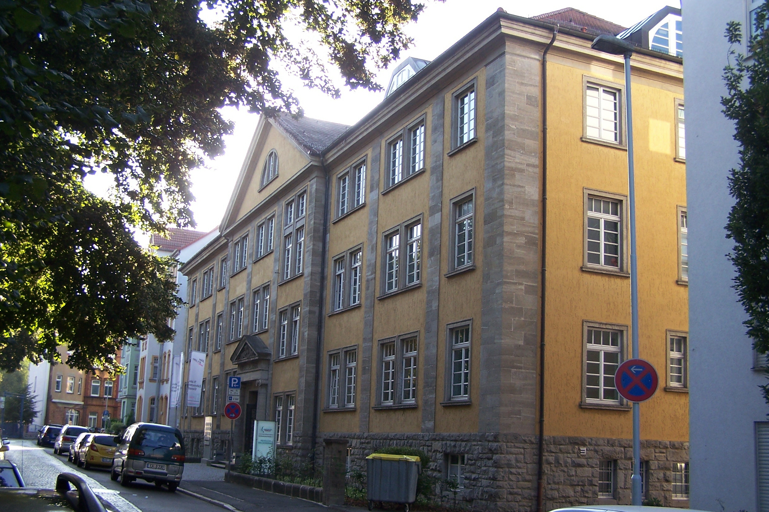 Das Gebäude von Westen.